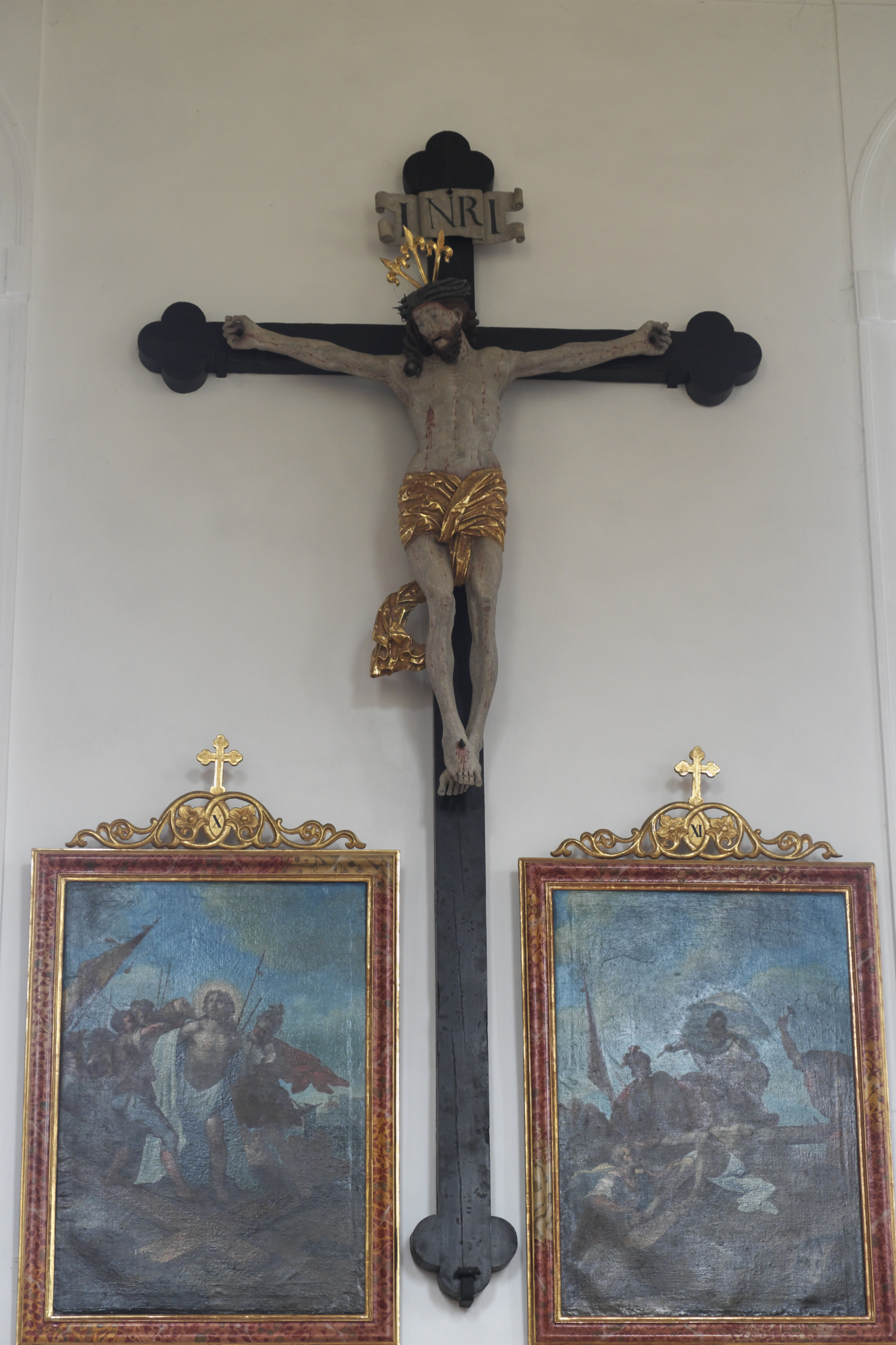 Katholische Pfarrkirche St. Walburga in Weißensee (Füssen) im Landkreis Ostallgäu (Bayern/Deutschland), spätgotisches Kruzifix, um 1500